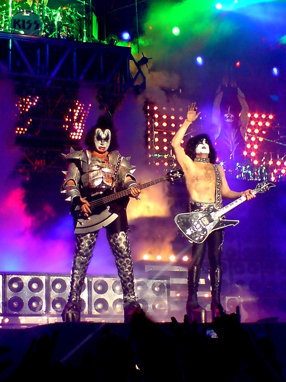 Det här är en manipulerad bild av basisten Gene Simmons och gitarristen Paul Stanley. Den togs under KISS spelning på Stockholms Stadion.